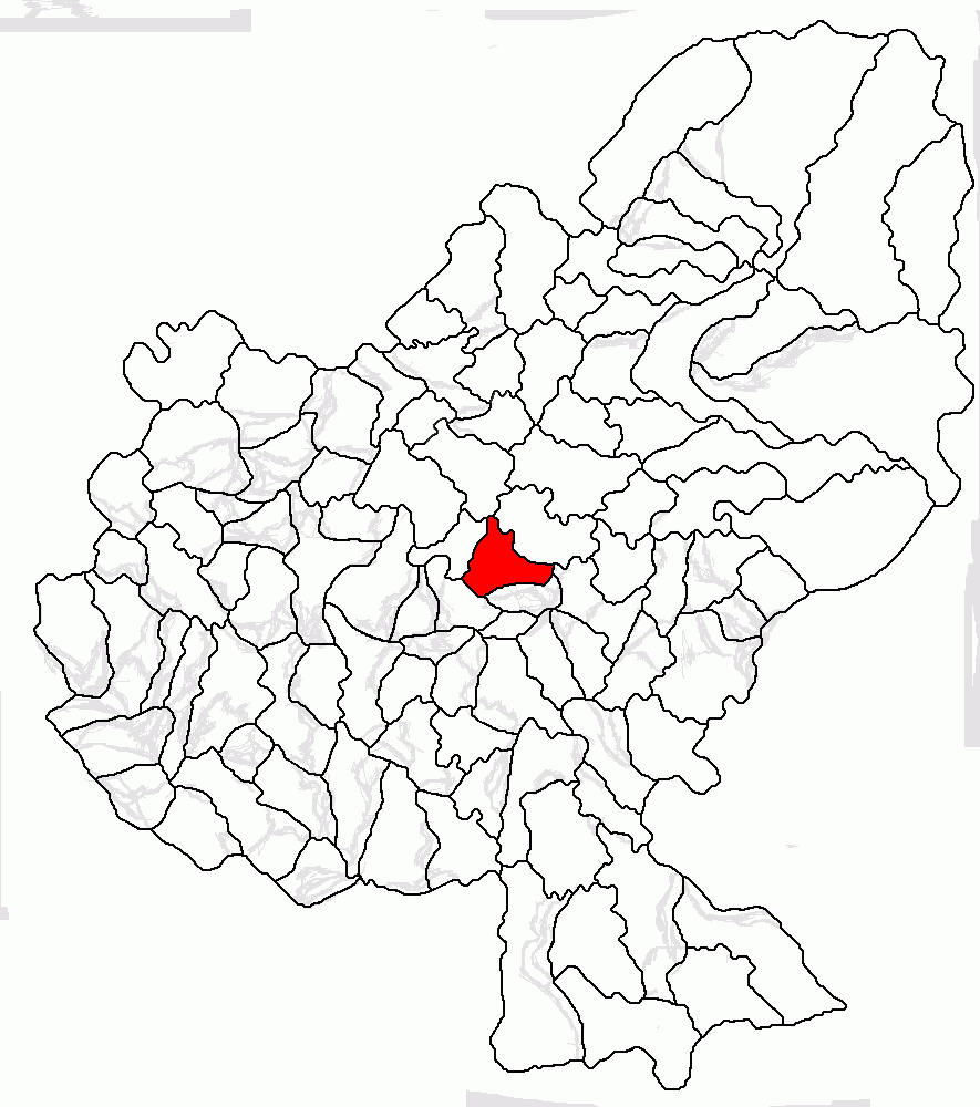 Categorie:Hărţi ale judeţului Mureş